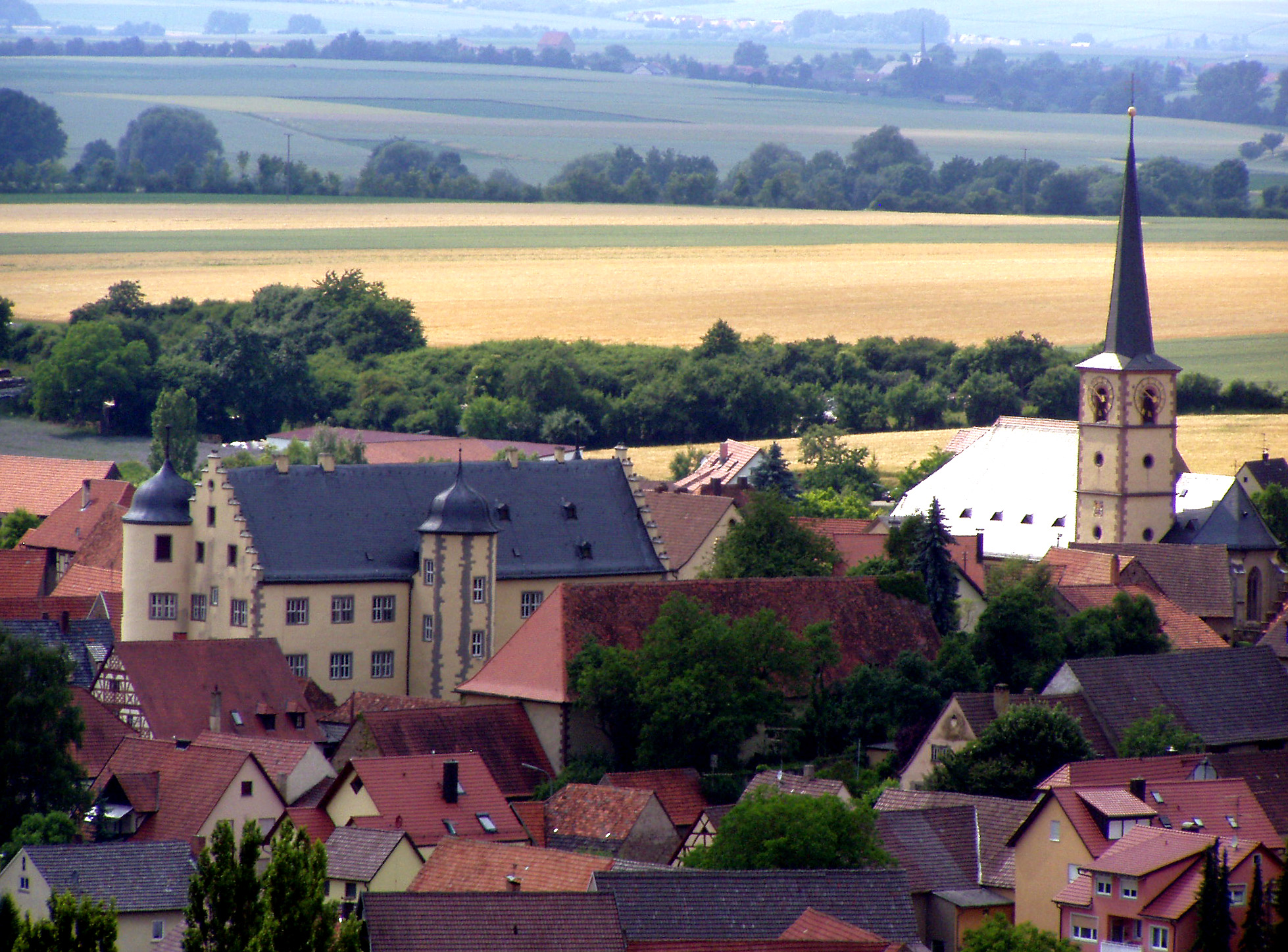 Der fränkische Weinort Oberschwarzach vom 'Oberschwarzacher Hörnle' gesehen, mit Schloss und Pfarrkirche.